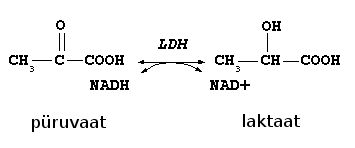 Püruvaadi konverteerimine laktaadiks. Tegemist on pöörduva reaktsiooniga. Teised lühendid tähendavad järgmist: NADH- nikotiinamiidadeniindidinukleotiid (redutseeritud vorm), NAD- nikotiinamiidadeniindidinukleotiid, LDH- ensüüm laktaadi dehüdrogenaas